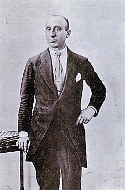 Leopold Hilsner (1876 - 1928), pravomocně odsouzeným vrahem Anežky Hrůzové a Marie Klímové.